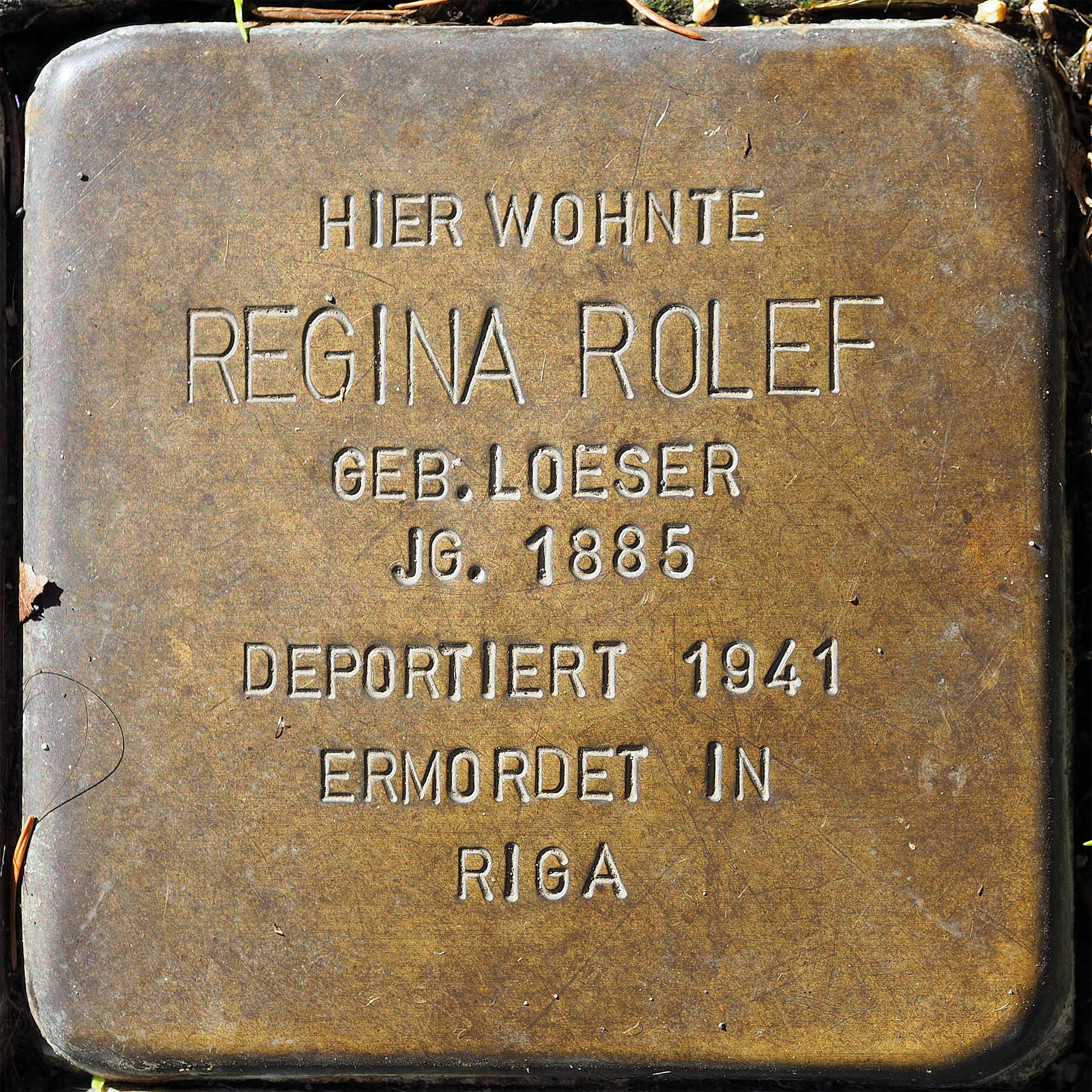 Stolpersteine MG: Rolef, Regina